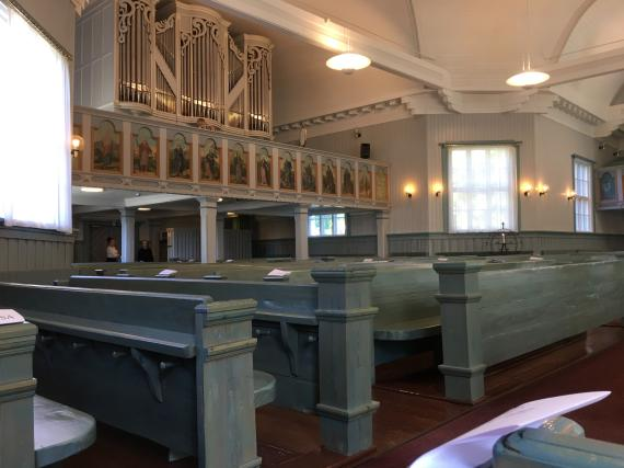 Nurmijärven Kirkon Urut